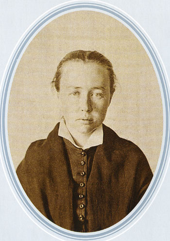 Sof'ja Perovskaja (1853-1881)